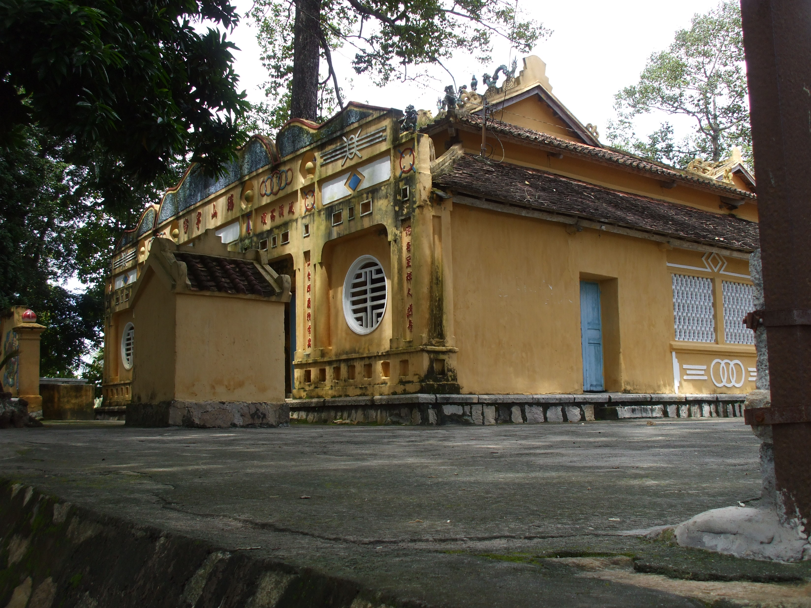 Đình Thần Thoại Sơn, thờ Thoại Ngọc Hầu và là nơi giữ gìn tấm bia cổ Thoại Sơn (huyện Thoại Sơn, tỉnh An Giang).